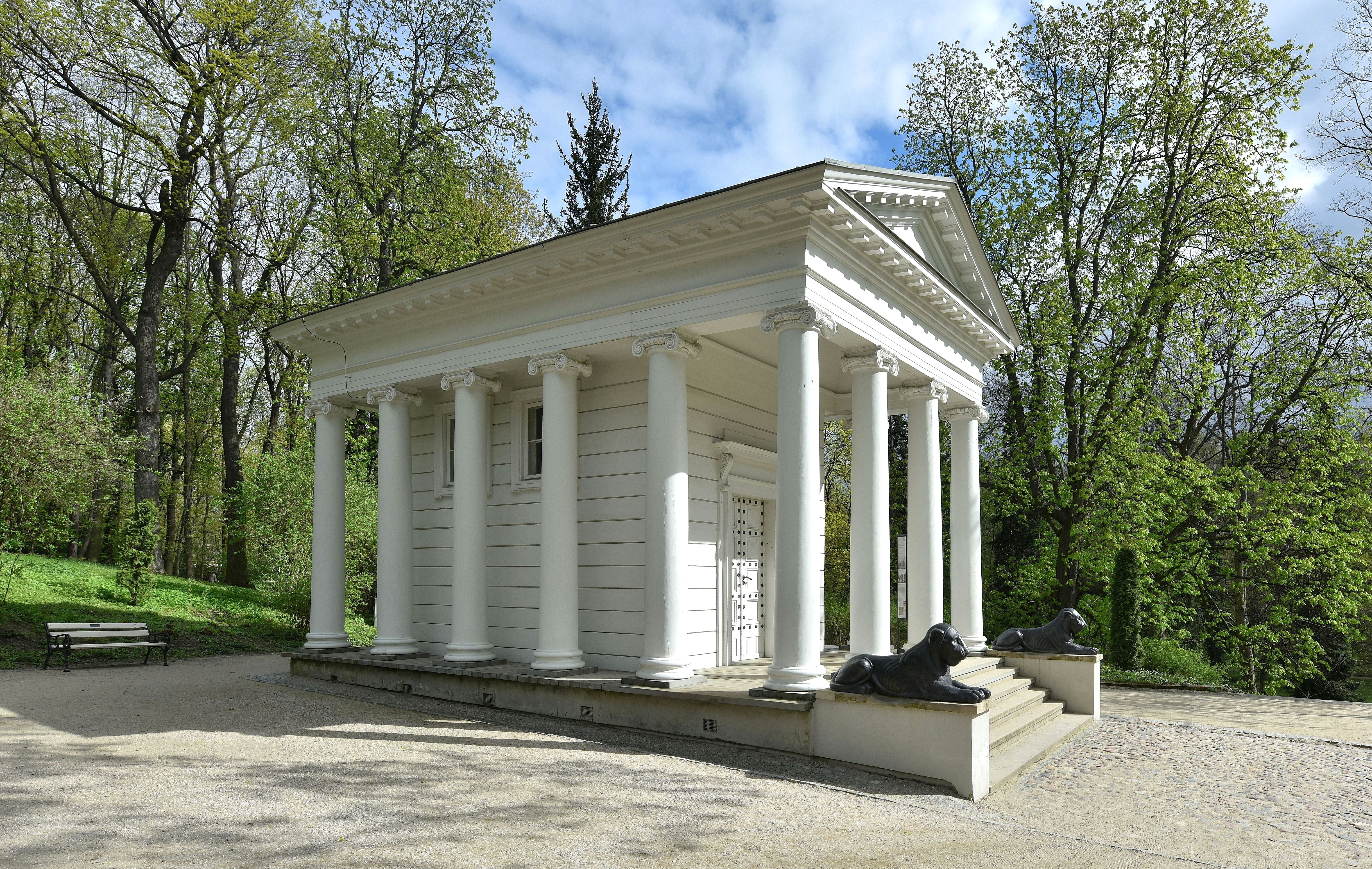 Świątynia Sybilii w Łazienkach Królewskich w Warszawie